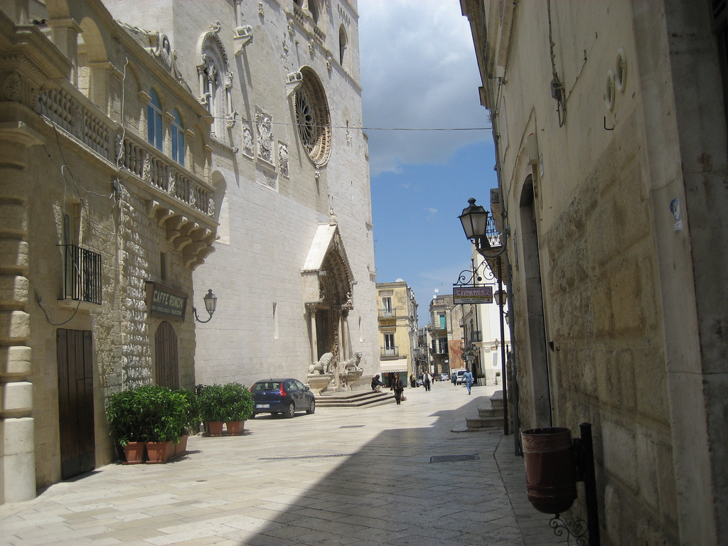 Scorcio cattedrale di Altamura